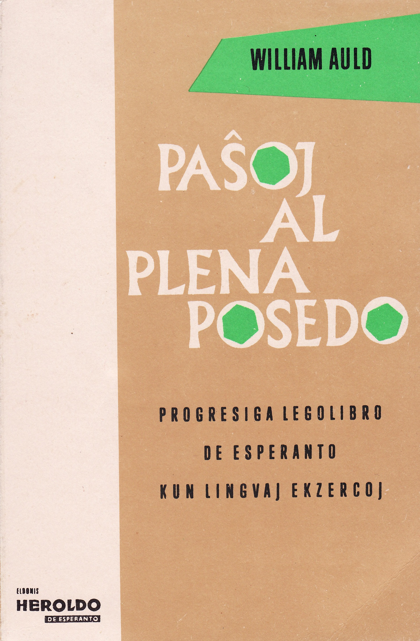 librokovrilo de "Paŝoj al Plena Posedo", 1980